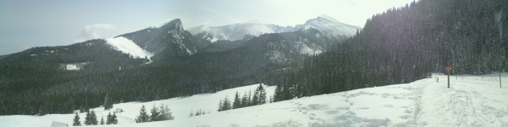 Widok z Polany Kalatówki